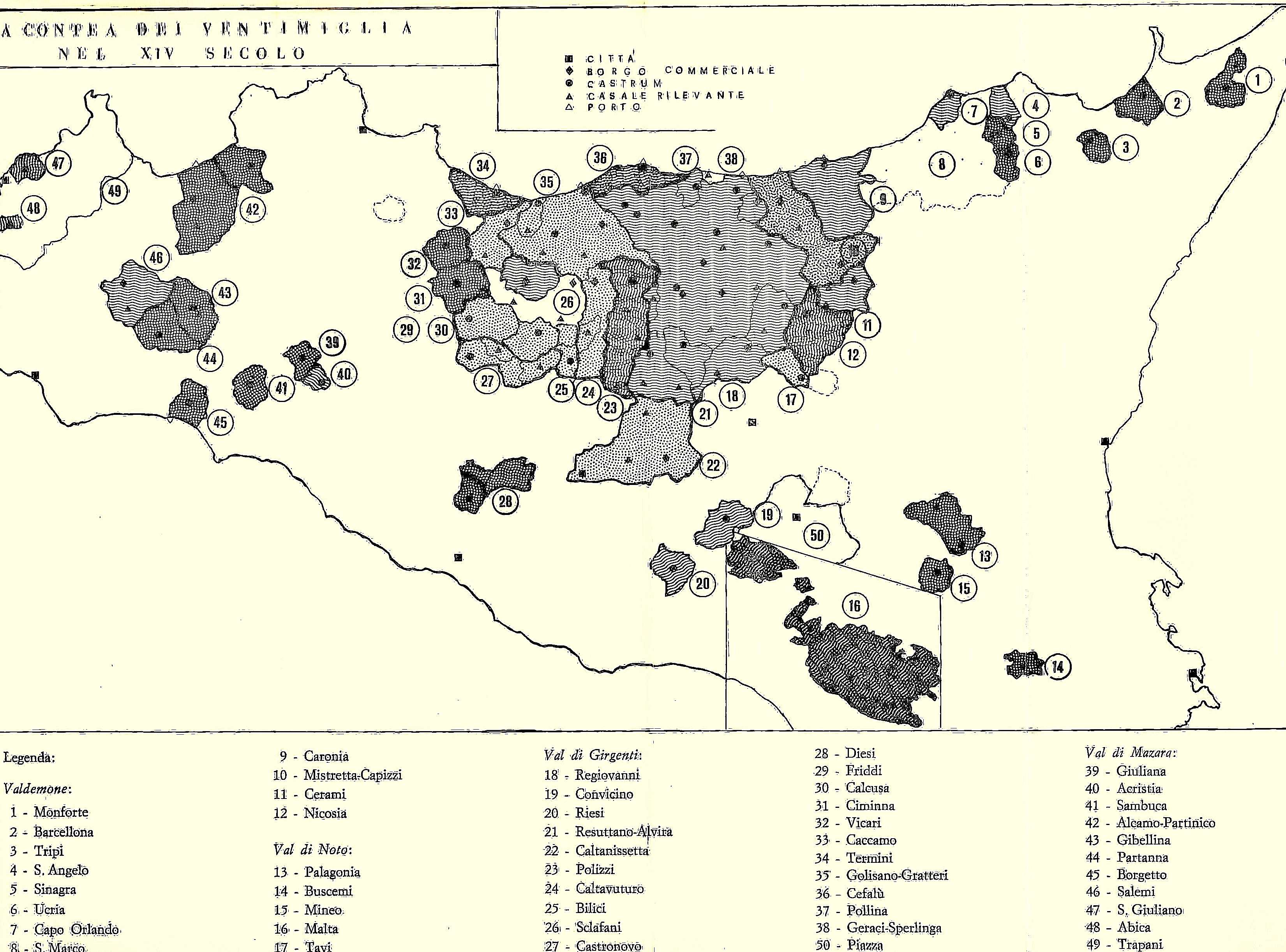 Territorio della signoria fondiaria dei conti di Ventimiglia nella Sicilia del Trecento